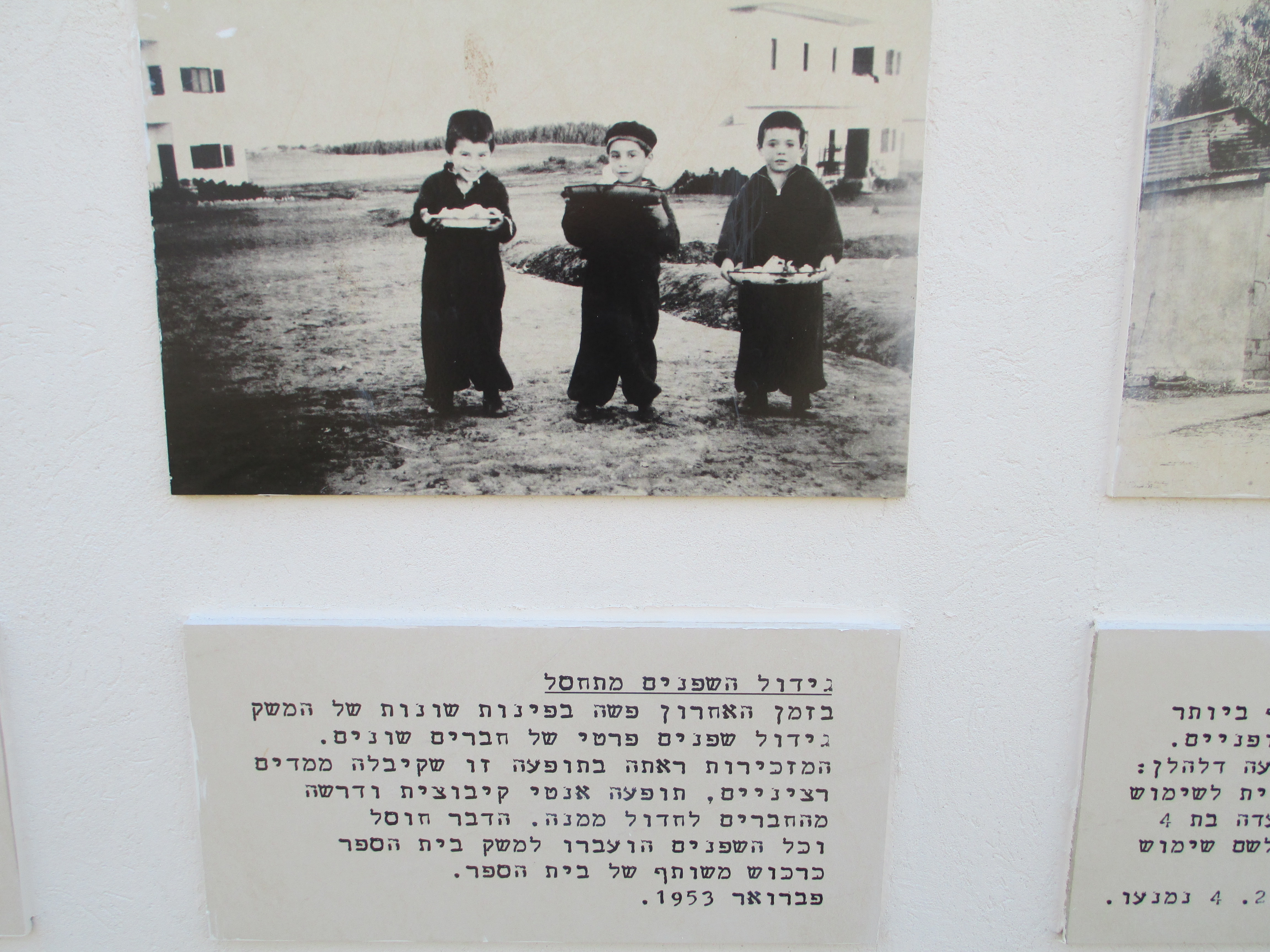 על גידול שפנים בקיבוץ שפיים